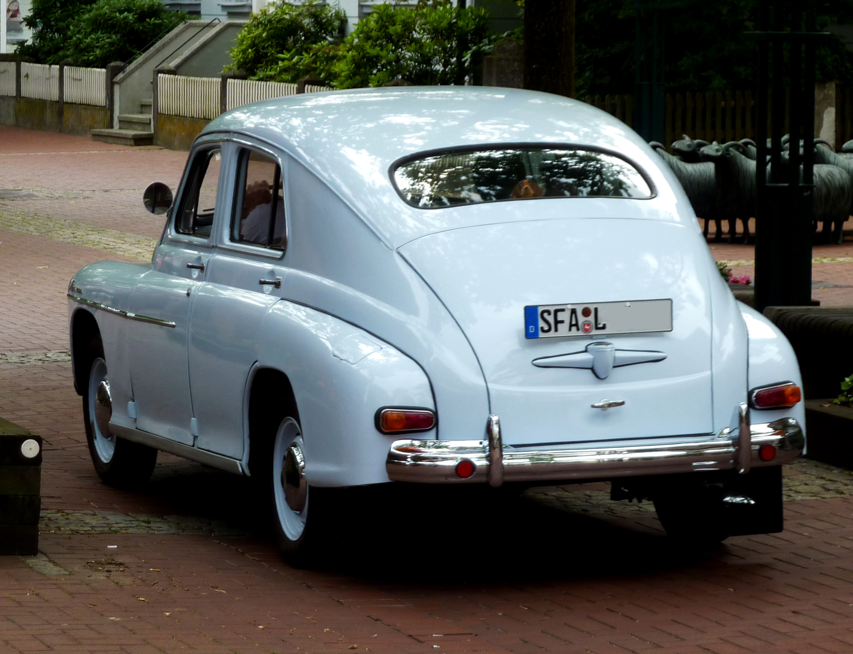 Warszawa M20, gebaut Anfang der 50er Jahre in Polen. Rückansicht. Fahrt durch Munster/Örtze in Niedersachsen, Deutschland.